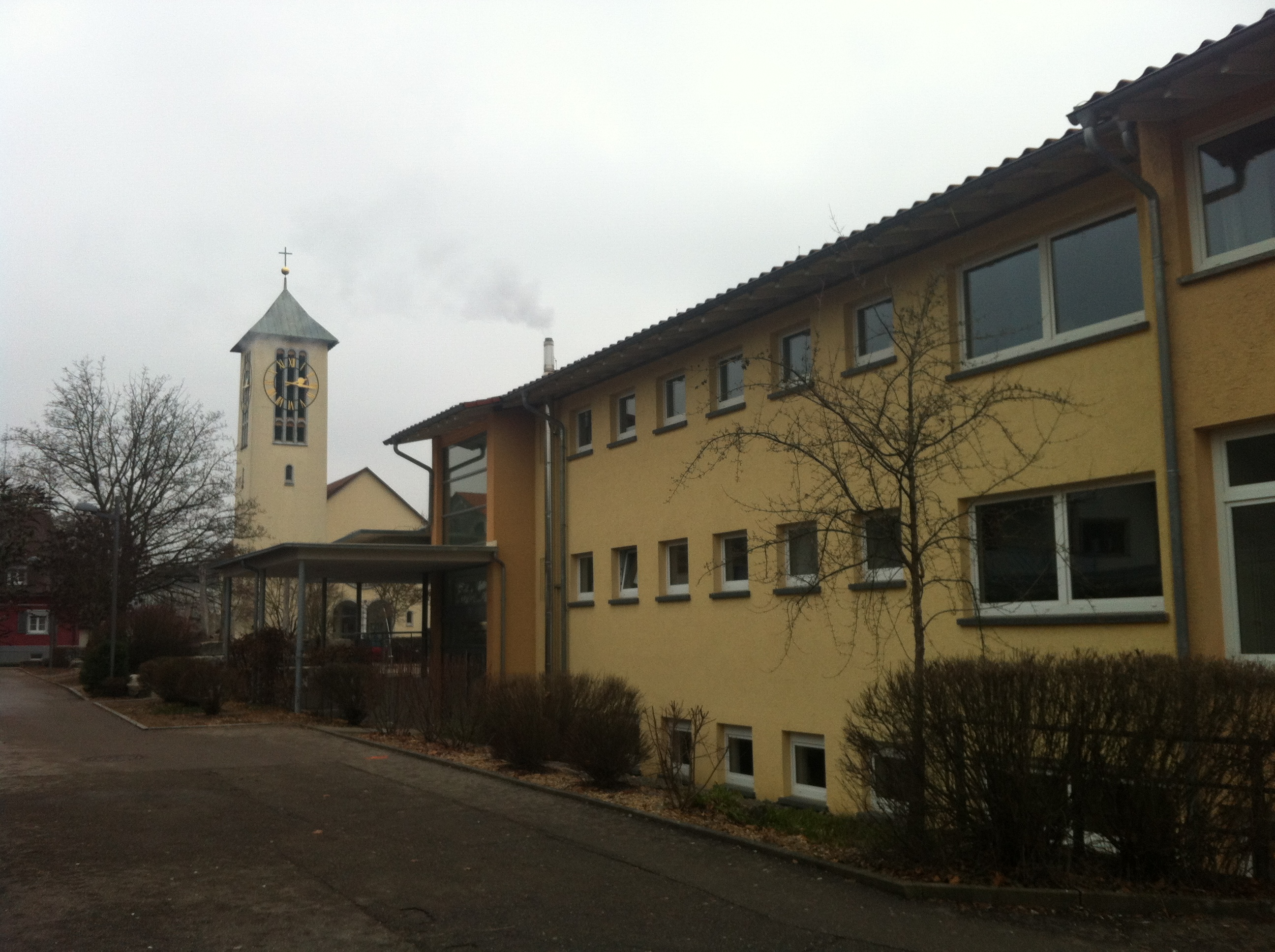 Hauptgebäude der Alemannenschule (Grundschule & Gemeinschaftsschule)/ Katholische Kirche in Wutöschingen im Landkreis Waldshut in Baden-Württemberg.